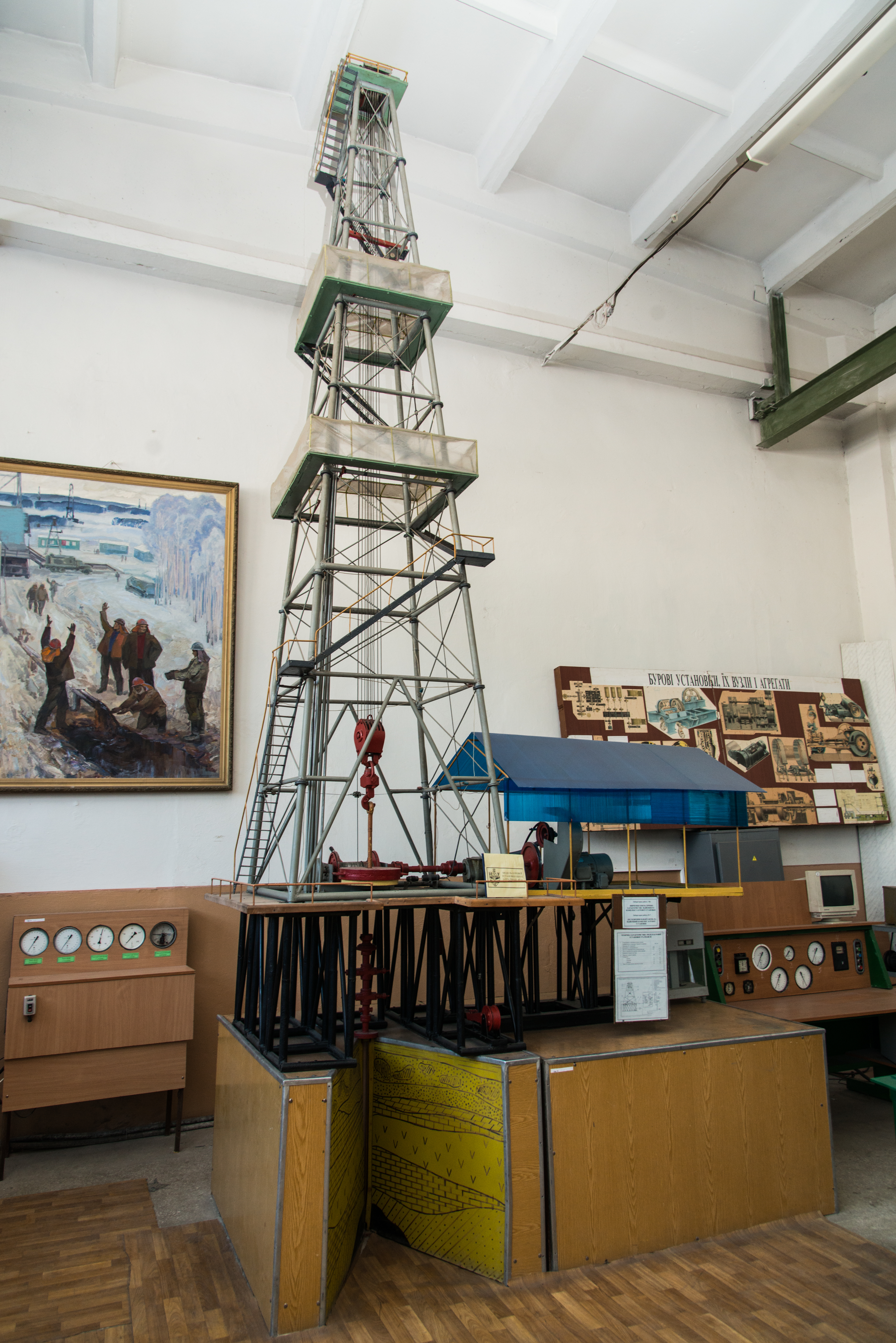 Макет бурової вишки в музеї